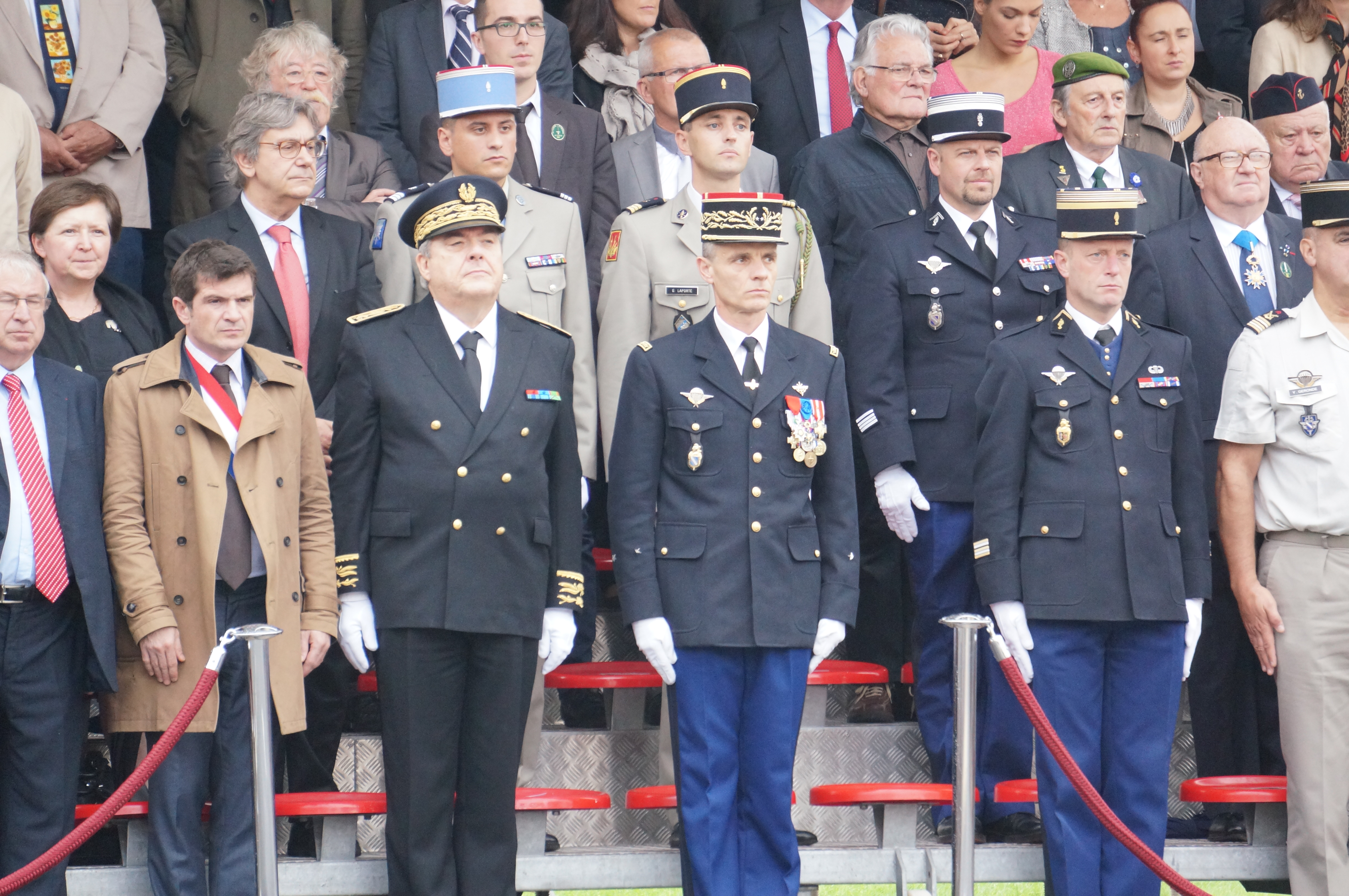 député de la Marne Prefet de région (Dartout)_général bruno Jockers de la gendarmerie. A gauche au premier plan, Bruno Bourg-Broc, sur la droite de Benoist Apparu ; au 3ème rang, de gauche à droite, Alain Biaux (Maire de Fagnières) et Rudy Namur.